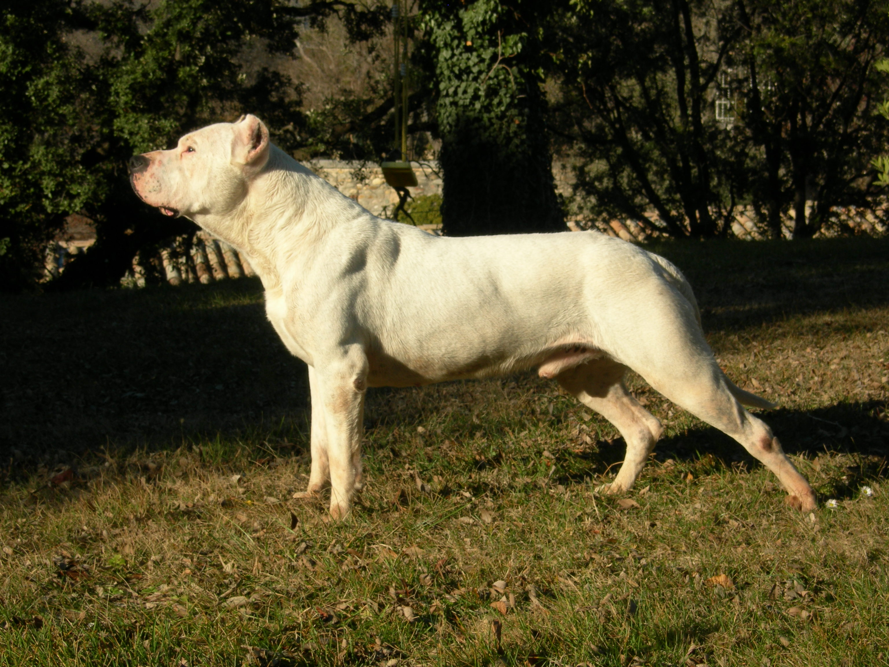 Dogue argentin - Name: Ridge Propriétaire: - Fred, du Domaine Salvator